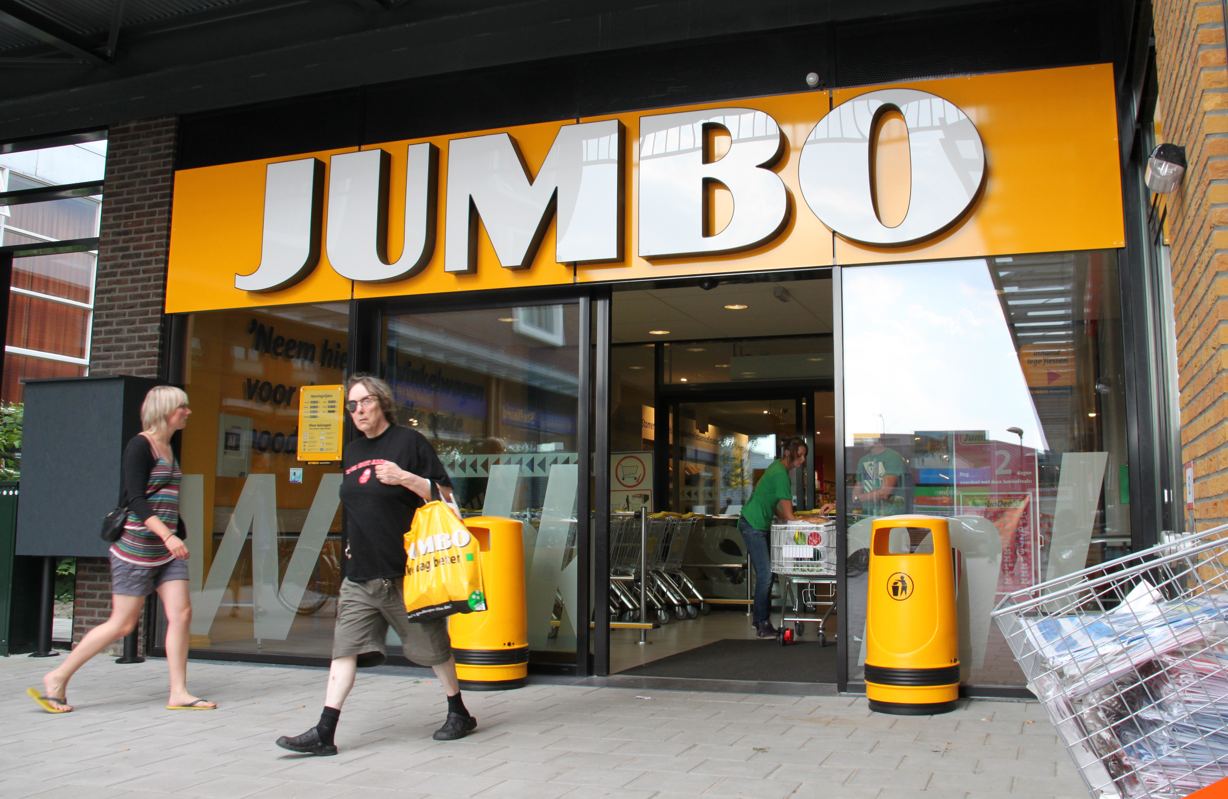 Filiaal van Jumbo Supermarkten aan het Ina Boudier-Bakkerhof in Utrecht.